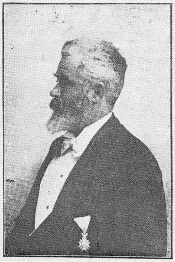 Srpski (latinica): Fotografija srpskog knjižara Miloša Valožića